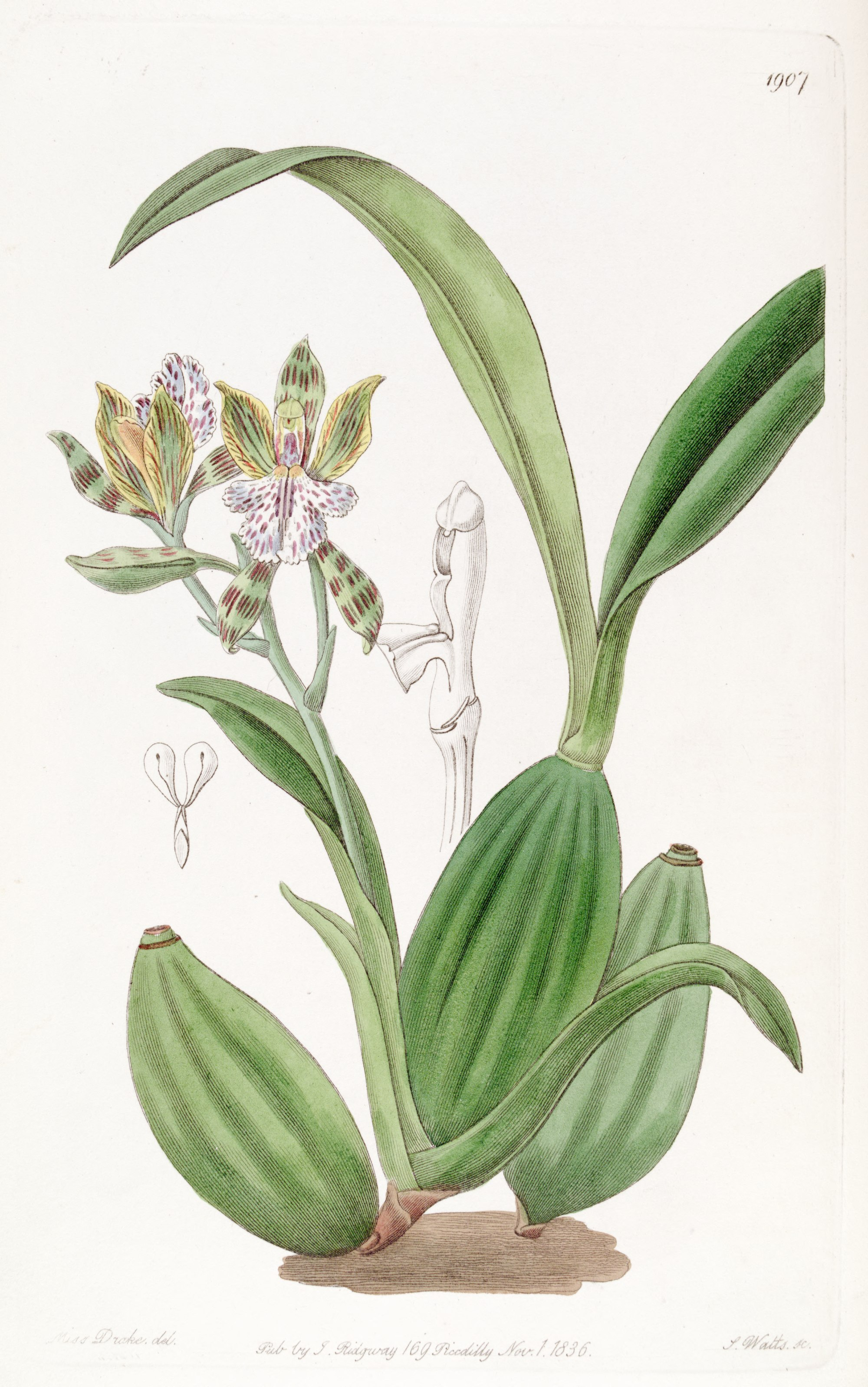 Aspasia variegata